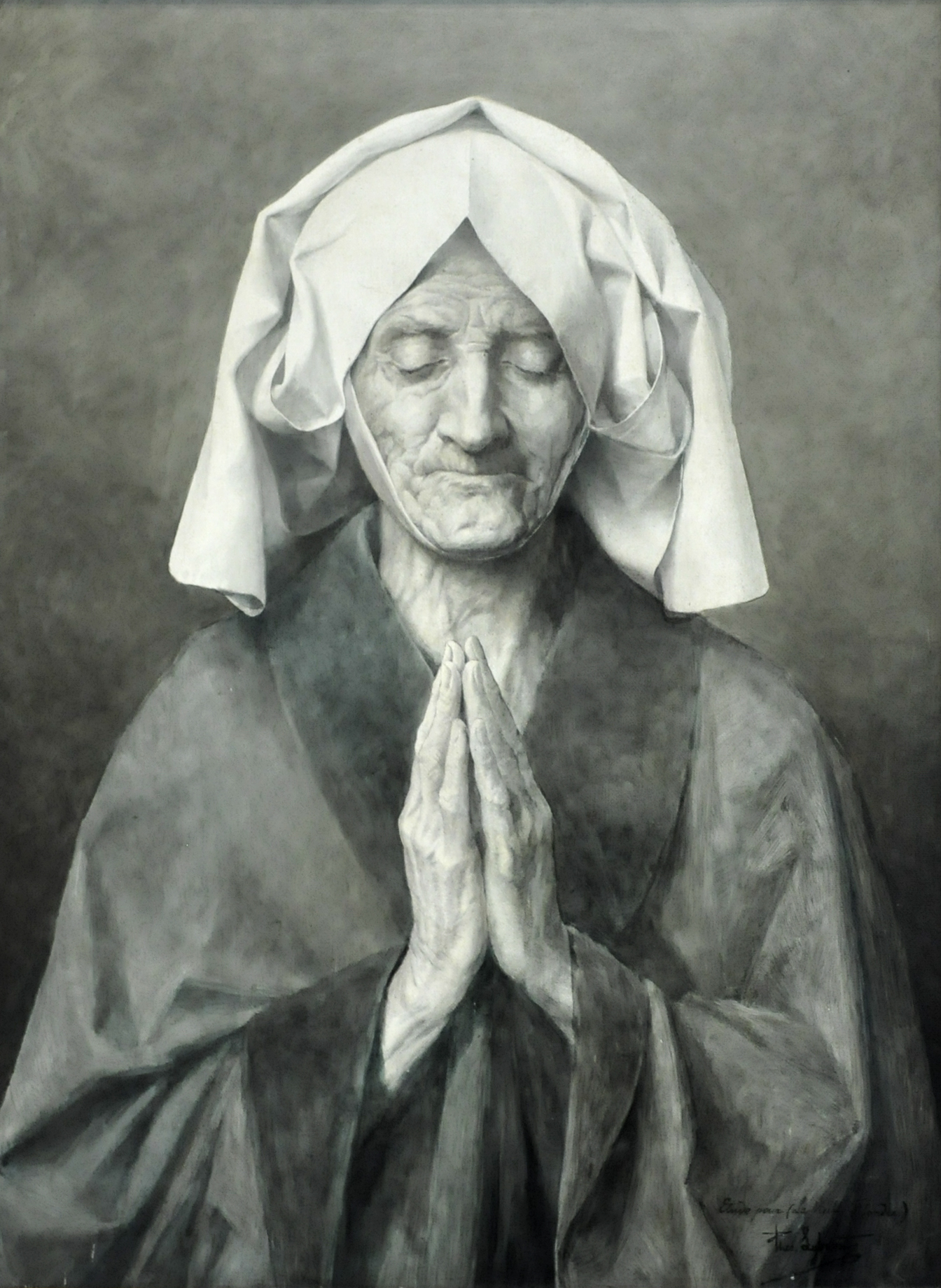 Théophile Lybaert (1848-1927) Biddende vrouw (studie) MSK Gent Wikidata has entry Q21679905 with data related to this item.